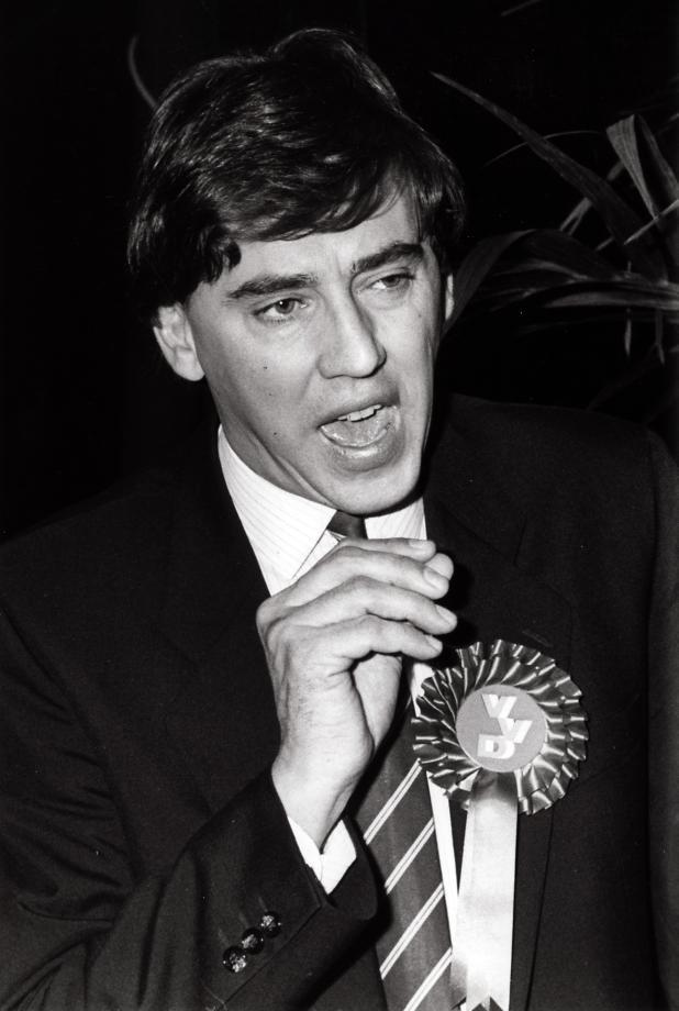 Ed Nijpels, VVD fractievoorzitter. Den Bosch, Nederland, 1 maart 1986.